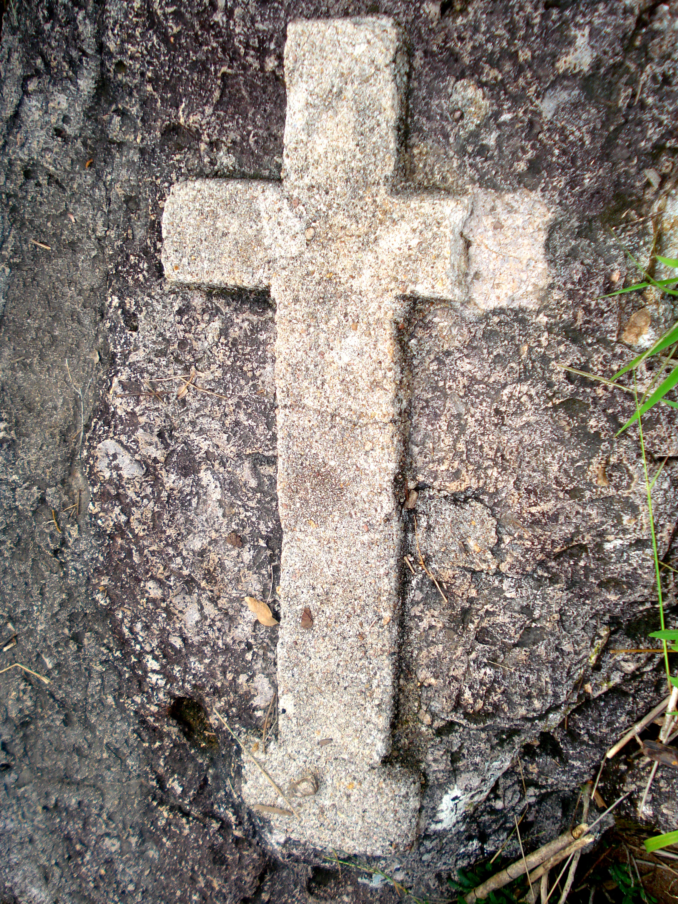 Cruz Piedra, Rio Sapo